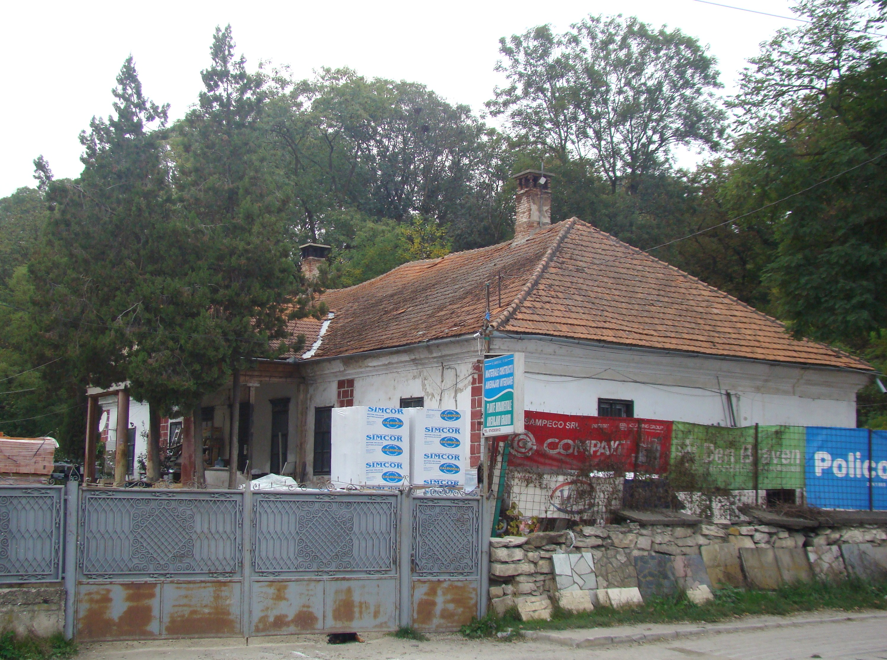 Fostă clădire anexă (șură) a Castelului Wass -Banffy, Str. Principală, sat Gilău 03